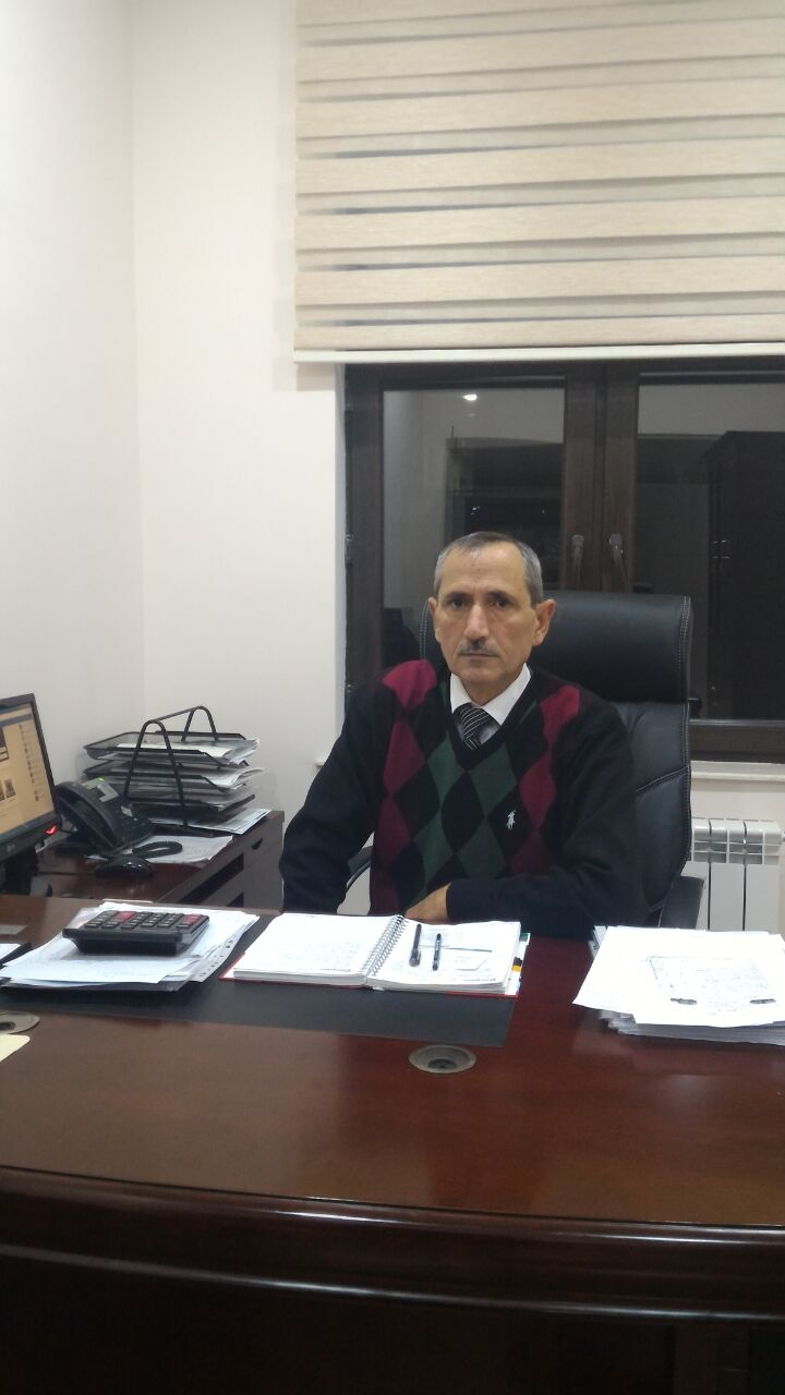 Xəlil Mirzə Xəlil Mirzəmməd oğlu Xəlilov Azərbaycan Yazıçılar Birliyinin üzvü, şair-publisist